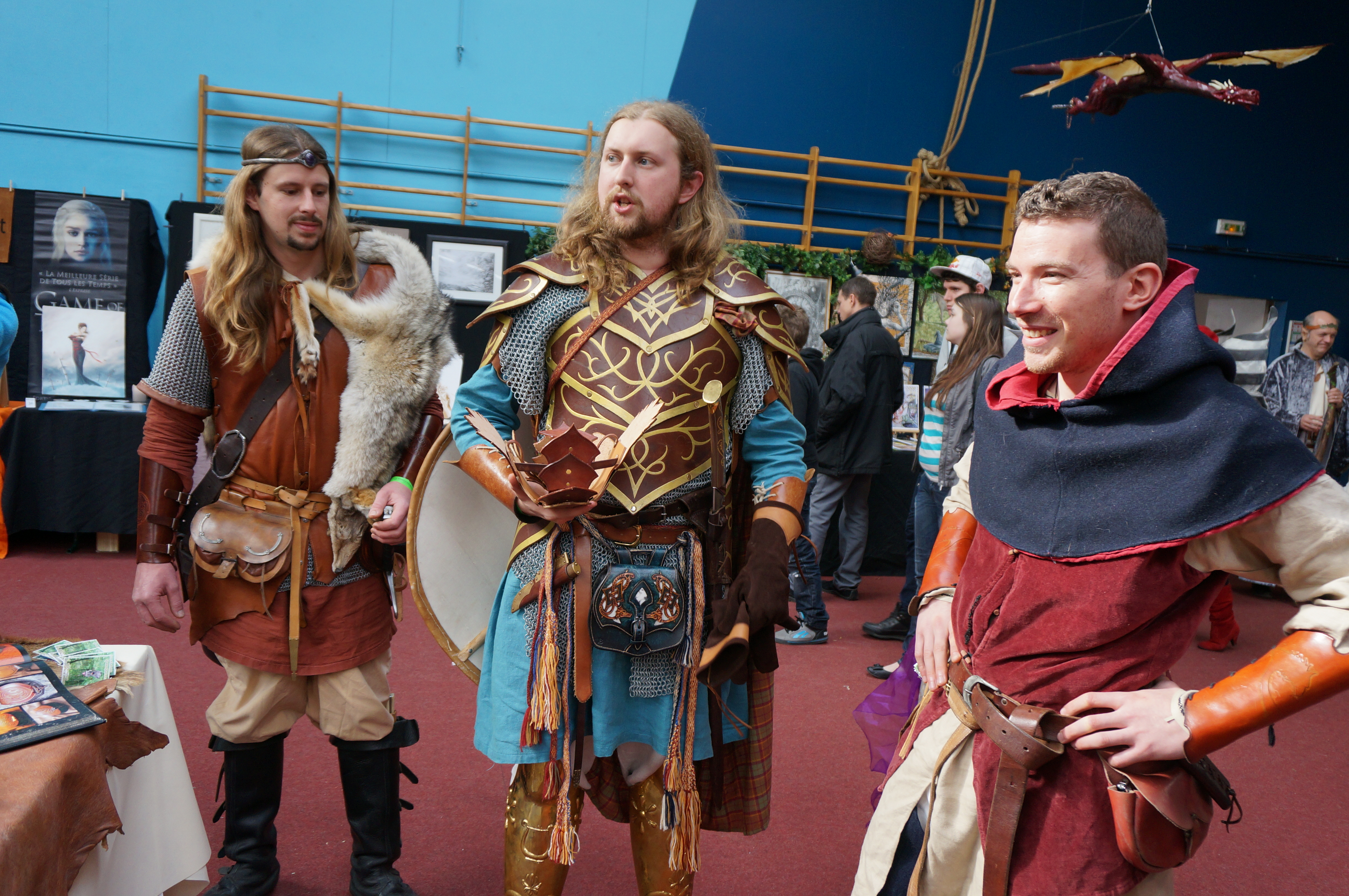 Lors du Printemps des Légendes 2014.